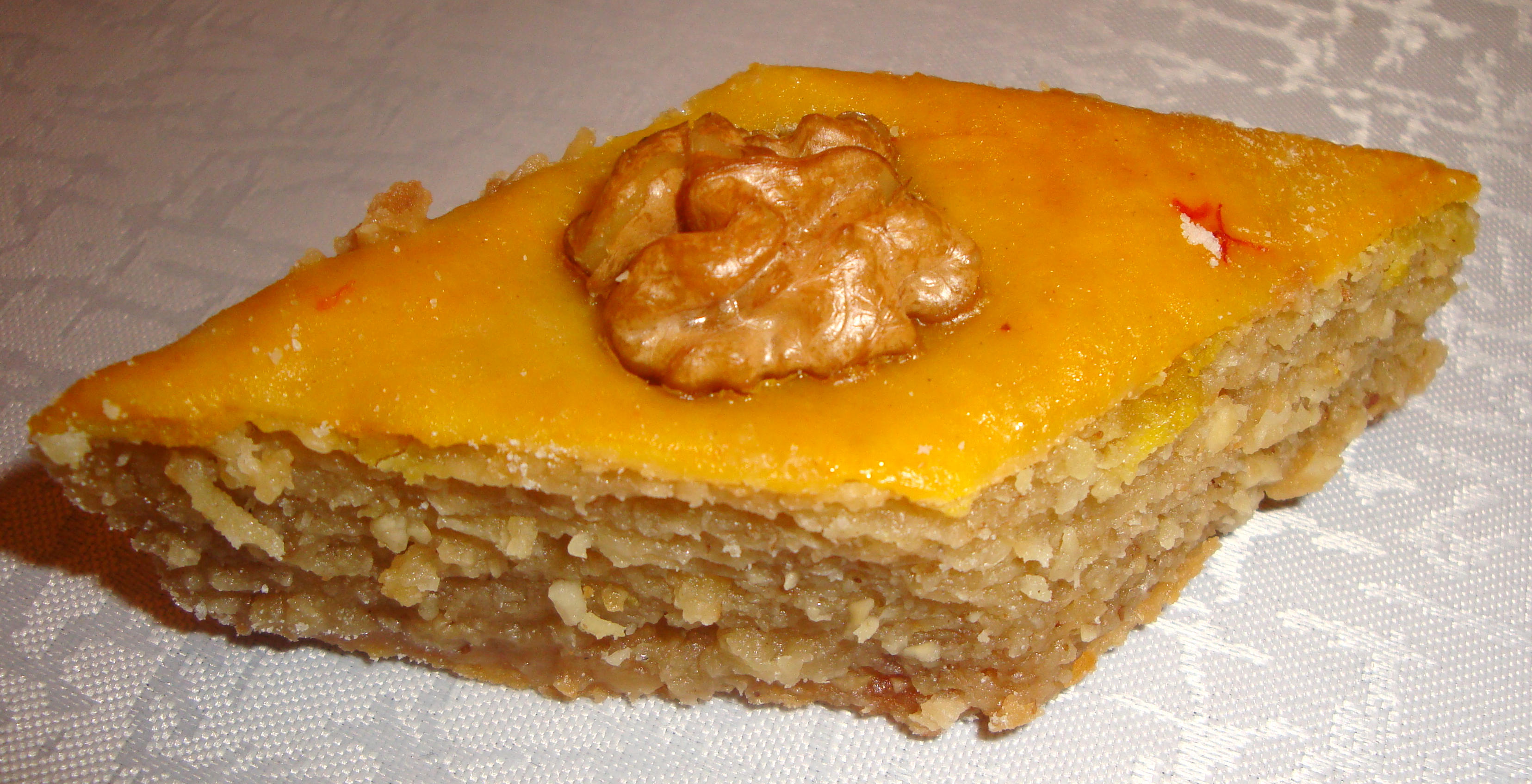 Azərbaycan paxlavası (fərdi evdə bişirilmiş)